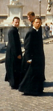 zelf gemaakt